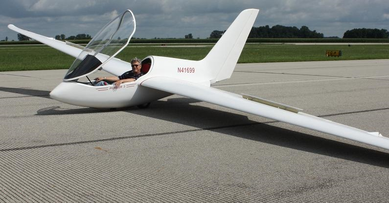 KN_ Jim Marske_in_Pioneer III_Prototype